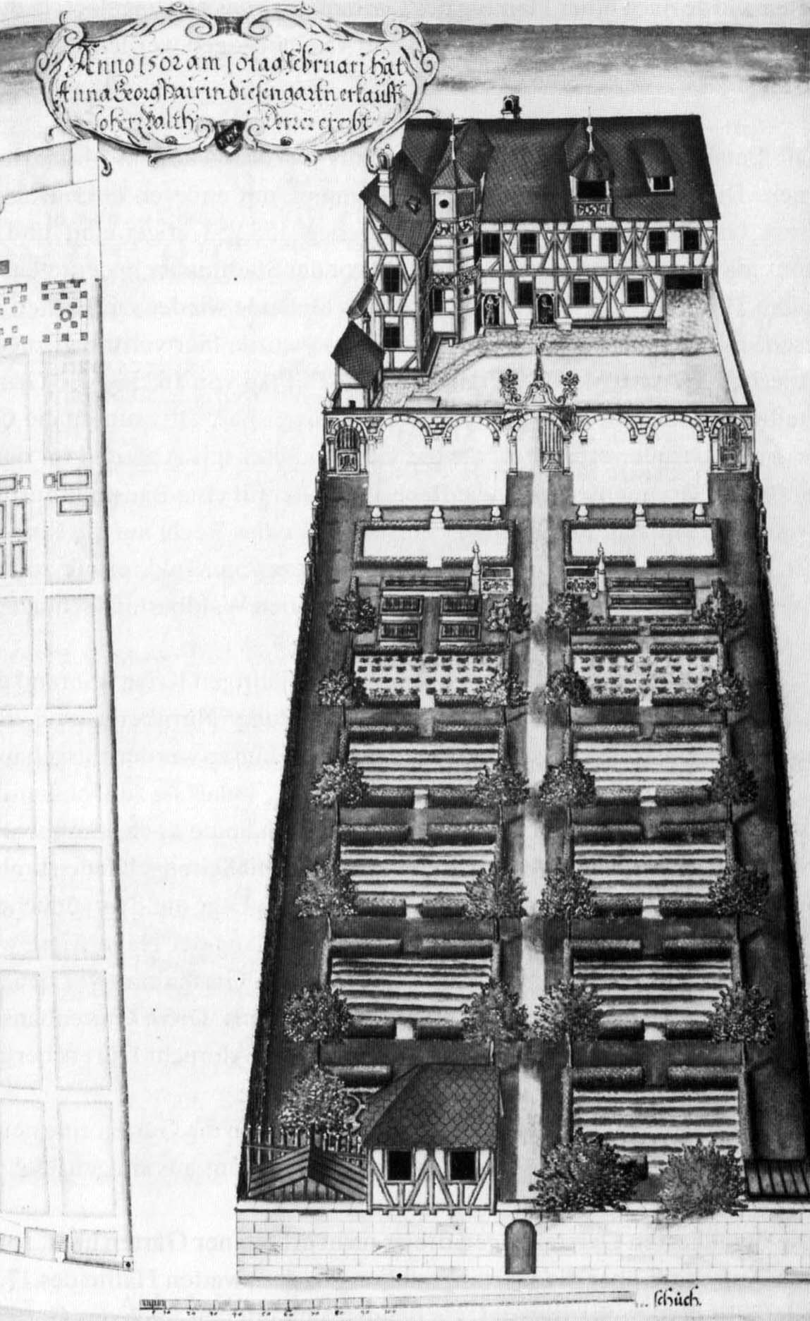 Gartengrundstück des Balthasar Derrer, Johannisstraße 43. Aquarell (ohne Jahresangabe). Aus: Geschlechterbuch der Nürnberger Patrizierfamilie Derrer. Nürnberg um 1626-1711.